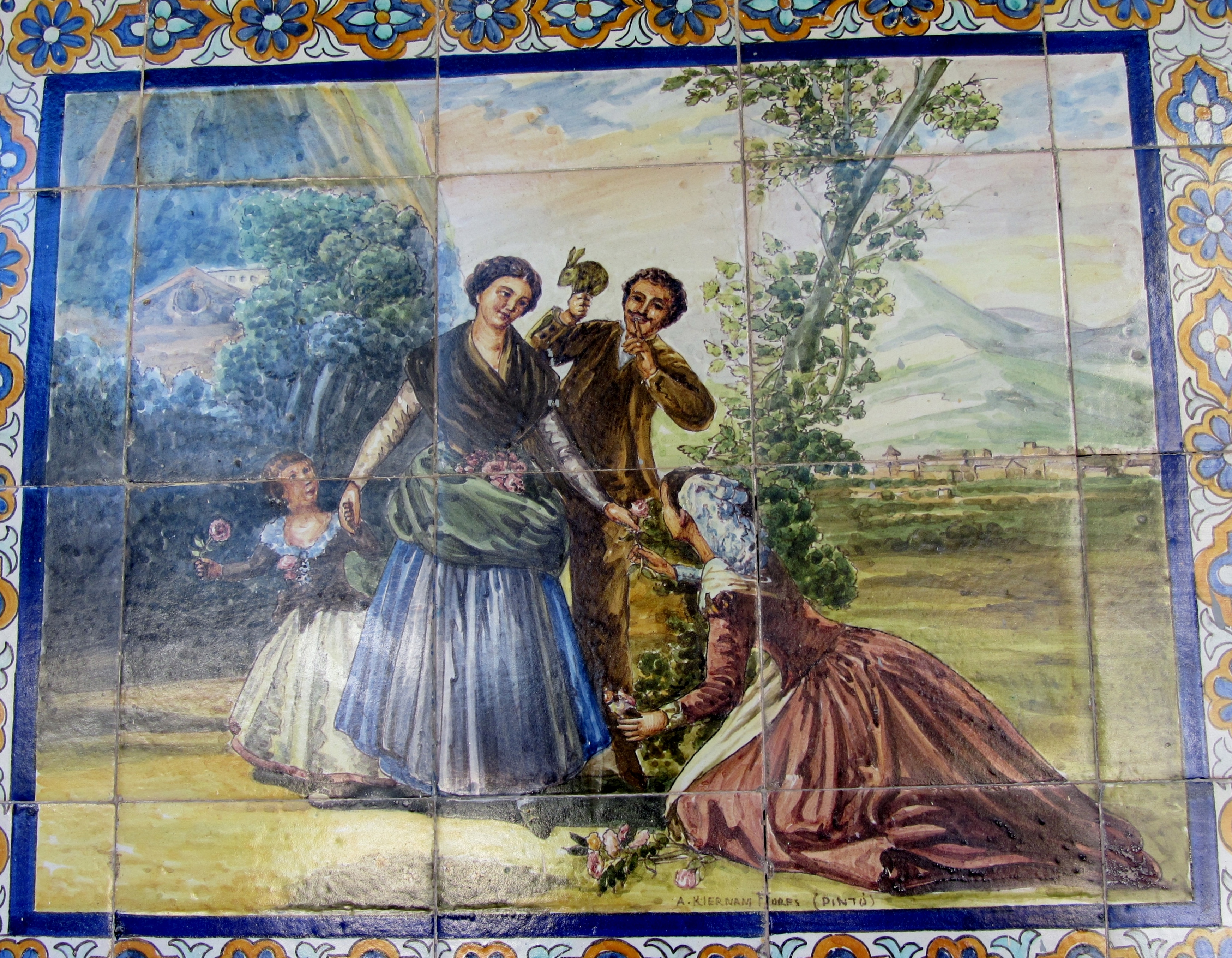 Azulejo en Santa Rosa de Apoquindo